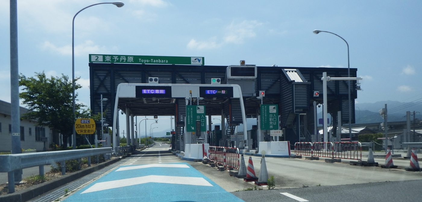 東予丹原インターチェンジ入り口